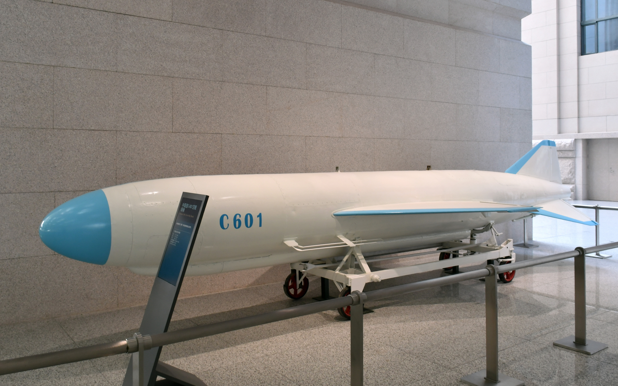 C-601 空舰导弹，“鹰击”6号空舰导弹的出口型号，拍摄于中国人民革命军事博物馆。